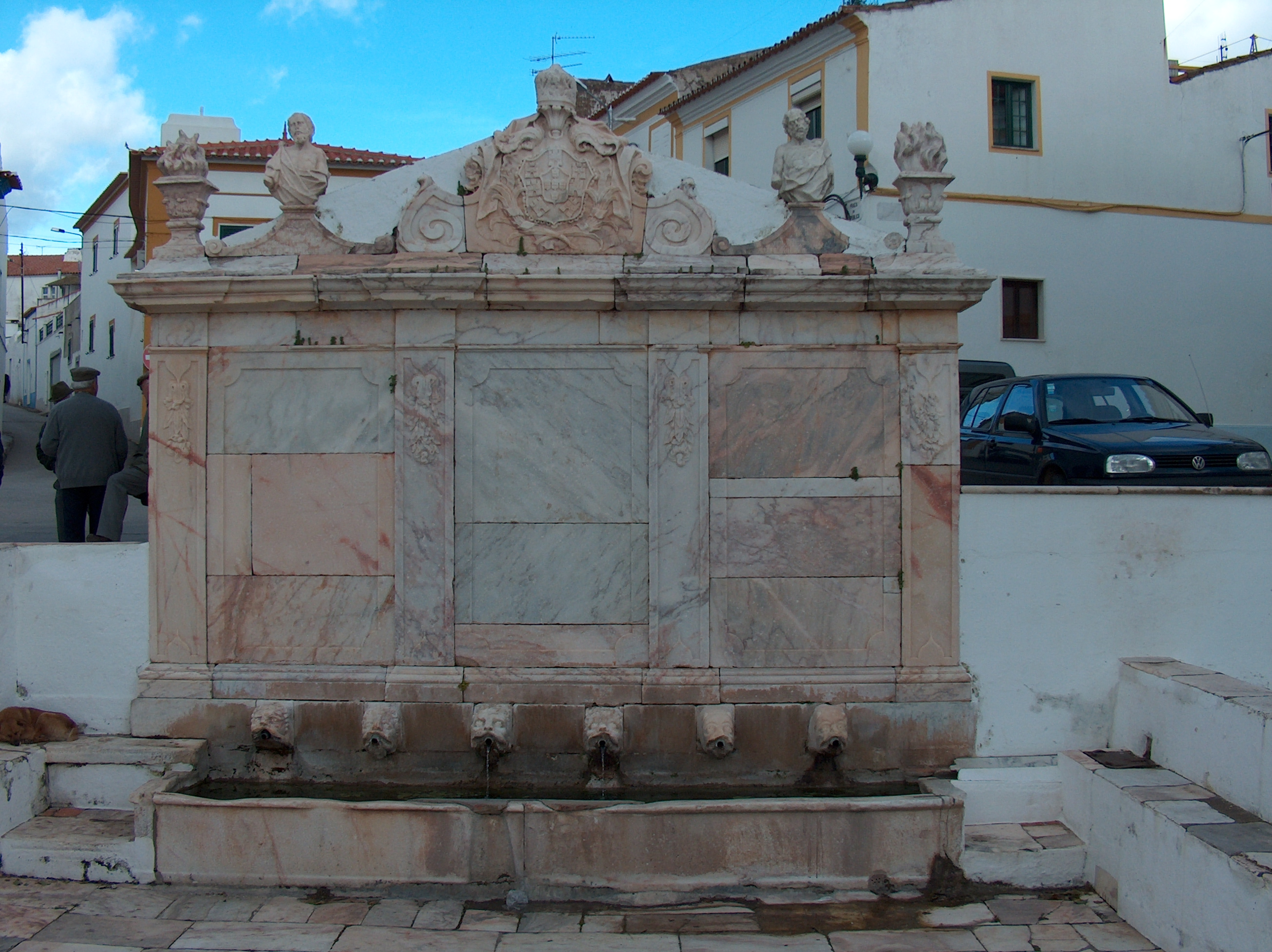 Fonte Monumental da Praça This file was uploaded for Wiki Loves Monuments in Portugal with the unique identifier 97004378.